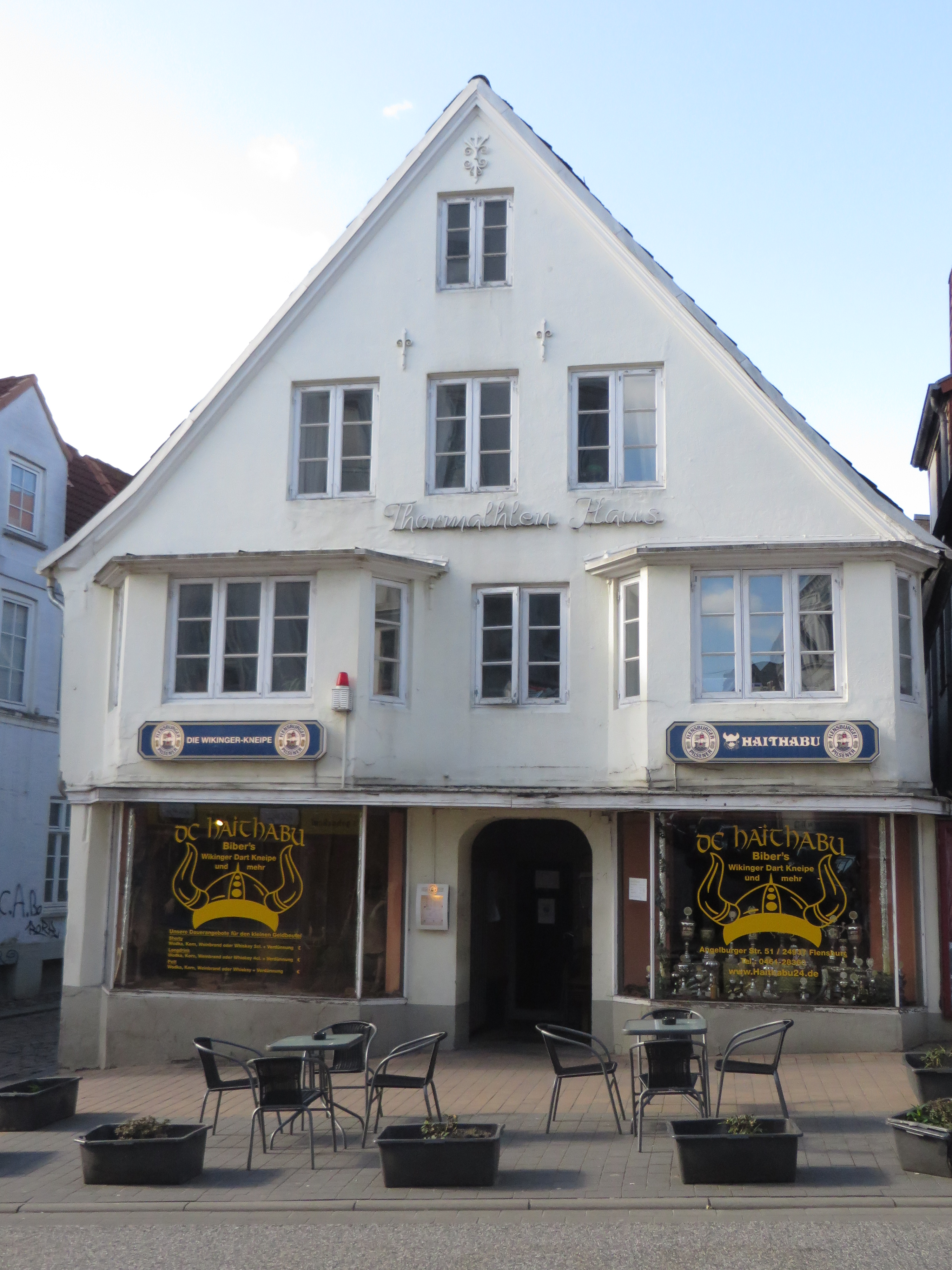 Thormählen Haus, Angelburger Straße 51, Flensburg 2016, Bild 01